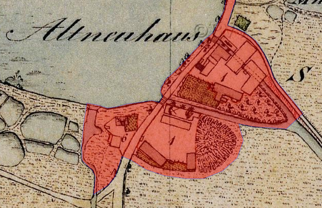 Altneuhaus